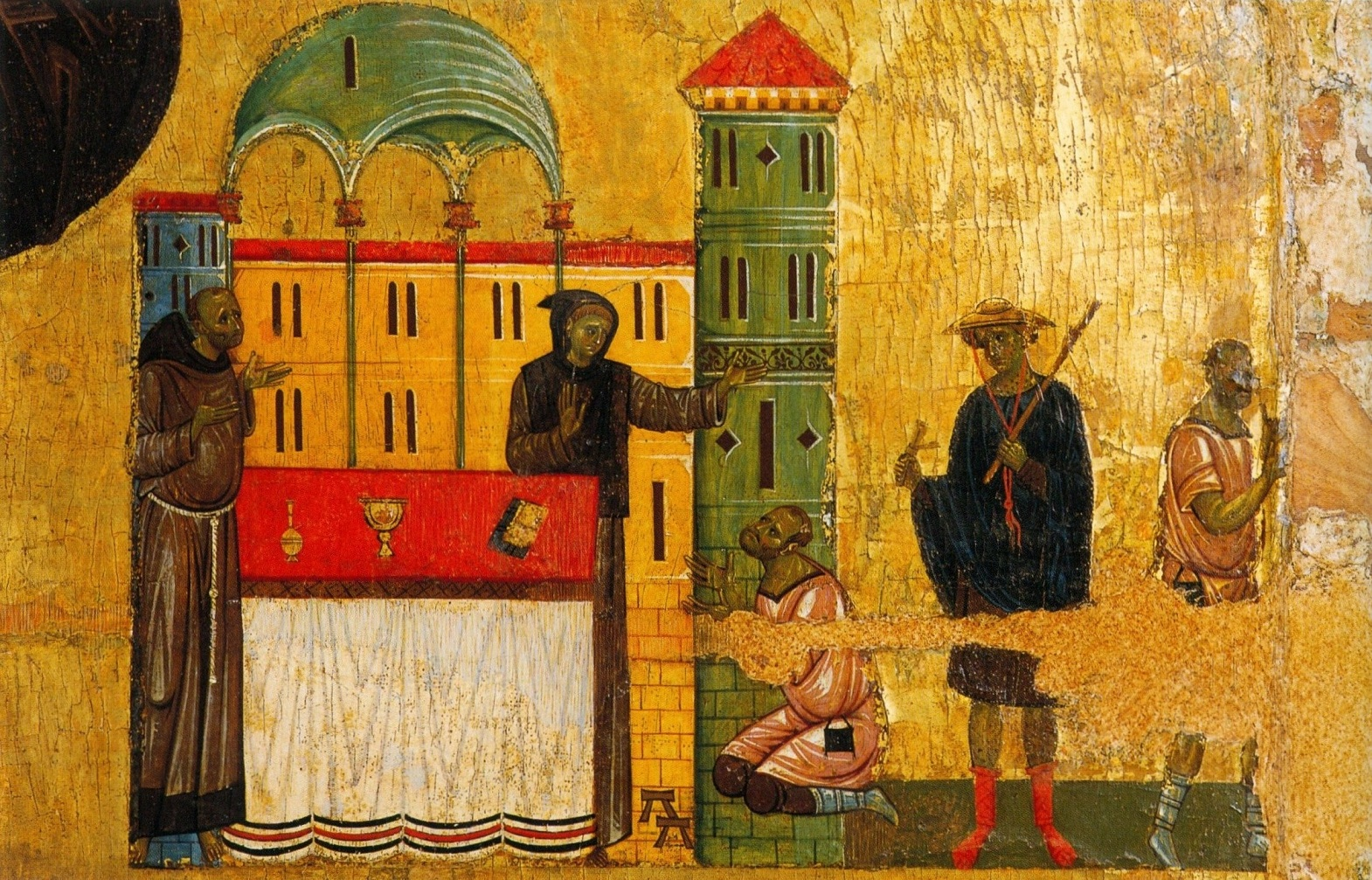 detail